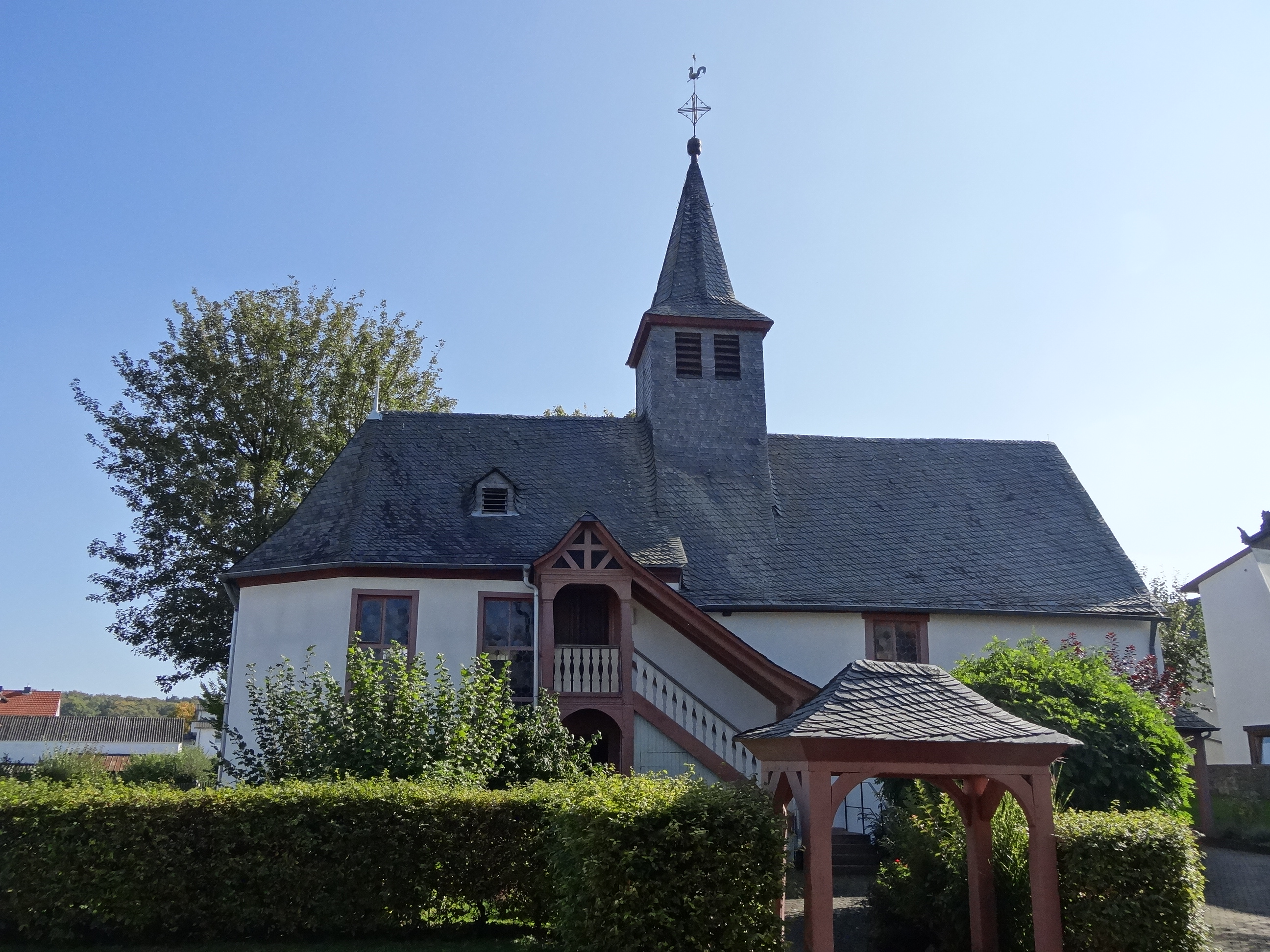 Ev. Pfarrkirche Ebersgöns